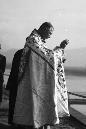 Biskup Franciszek Barda dokonuje poświęcenia jazu na Sanie.